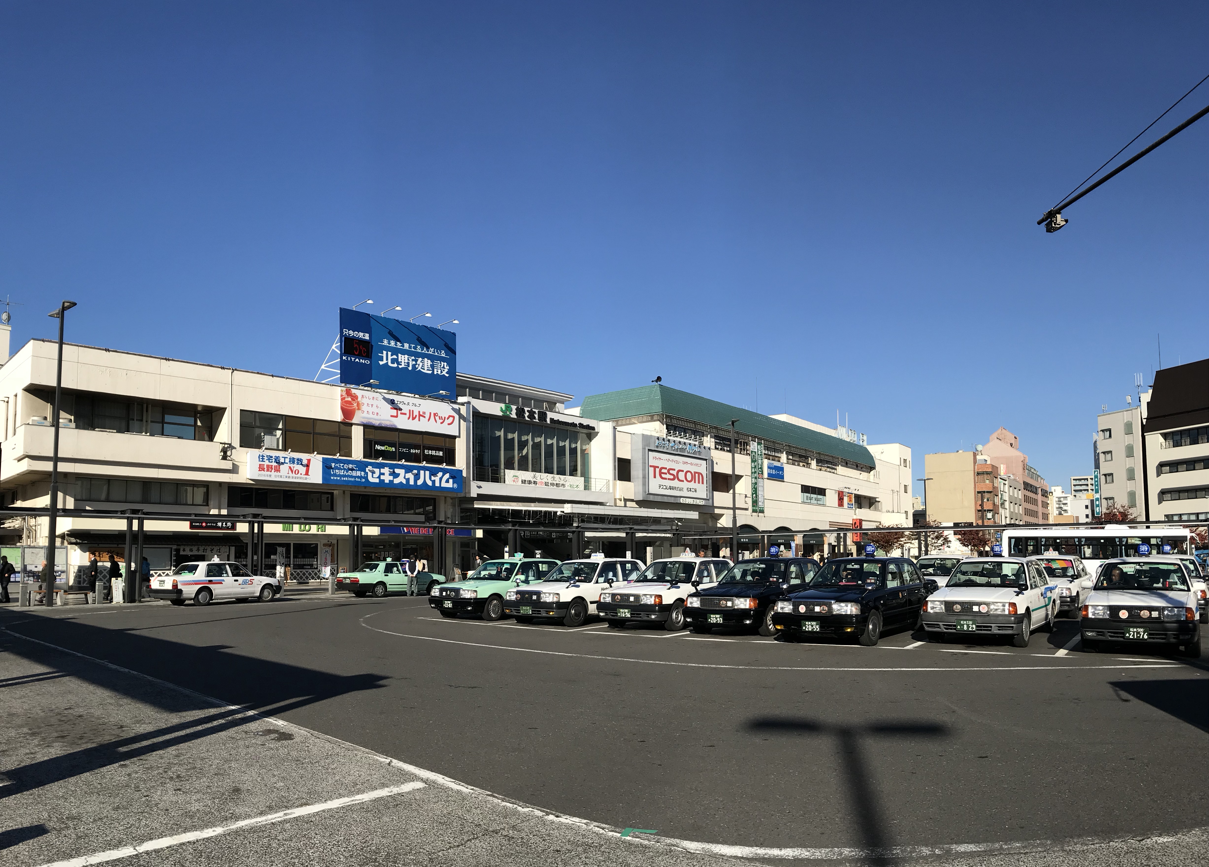 松本駅 / 2017